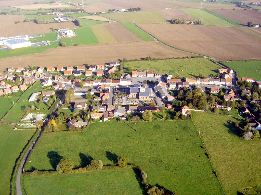 Vue aerienne du Village de Borre (Nord 59 France) prise en octobre 2006 Contact Photographe